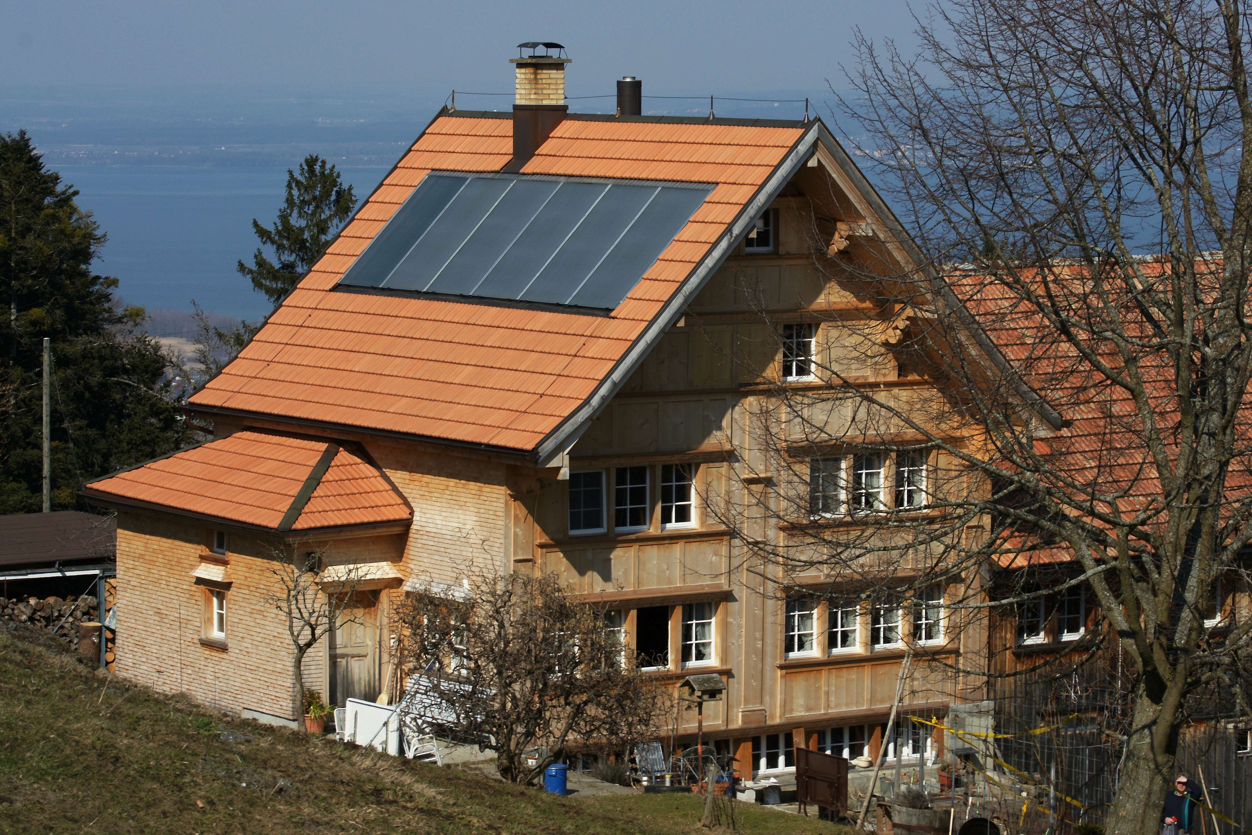 Appenzeller Bauernhaus gelegen an der Oberlindenberg Strasse in Wolfhalden.